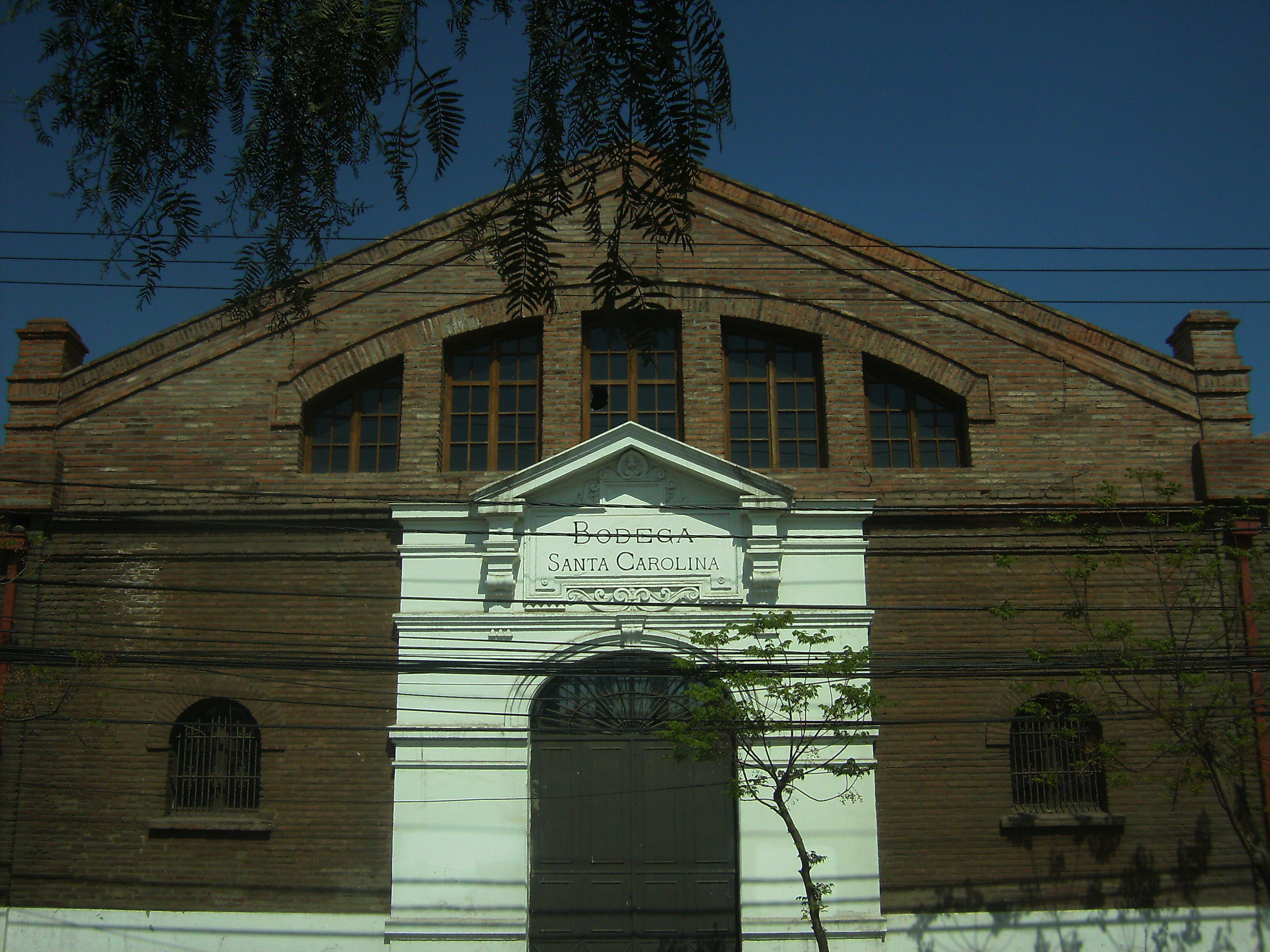 Antiguas bodegas y embotelladora de vivos de calle Rodrigo de Araya 1431, antiguamente rodeadas de viñas hoy en medio de la ciudad. This is a photo of a national monument in Chile: 1252